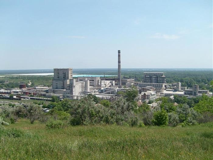 Общий вид Лисичанского содового завода